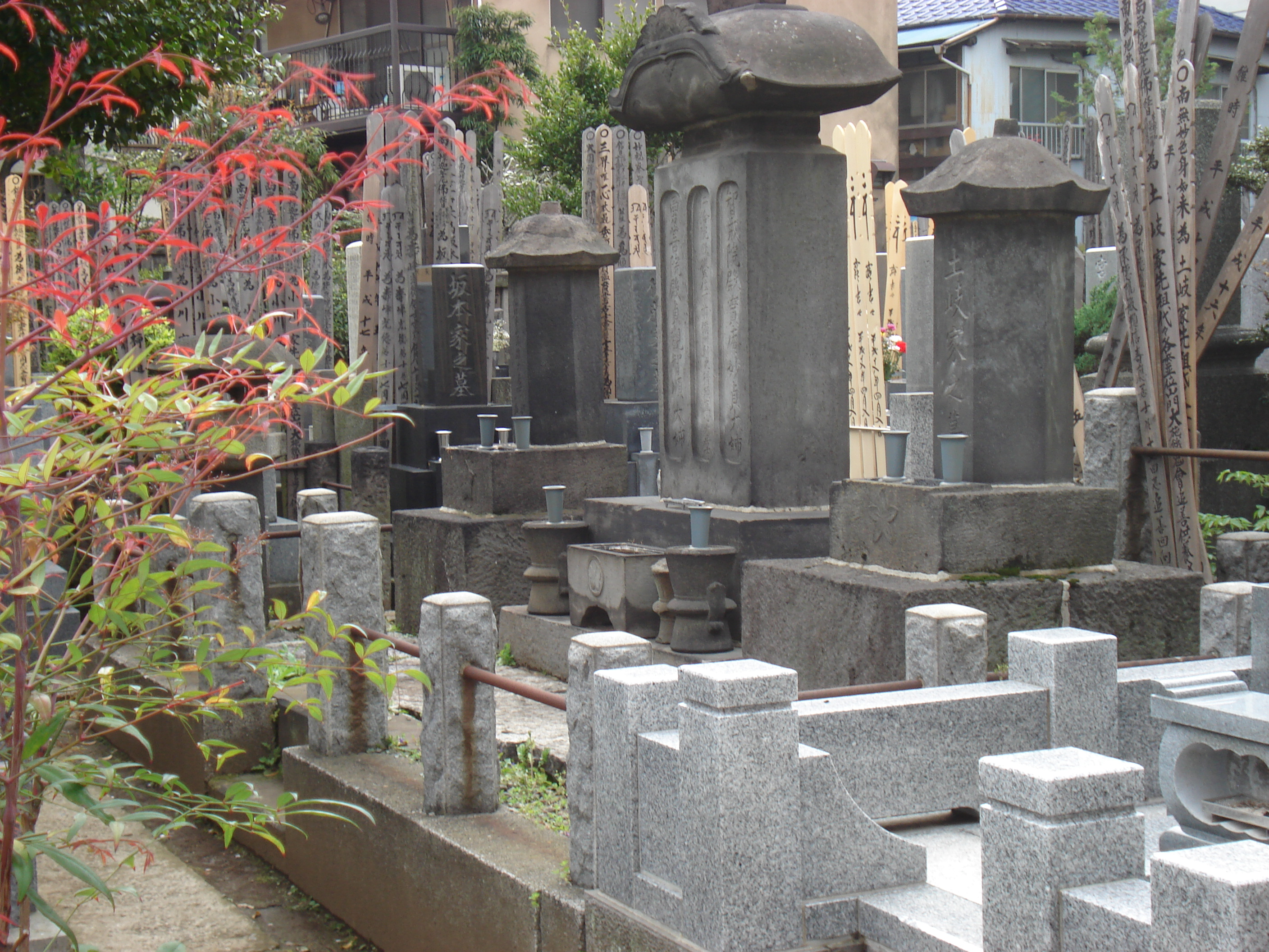 東京駒込白華山養源寺